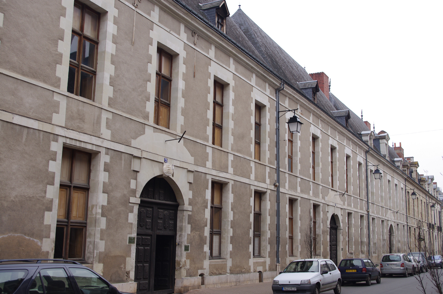 Hôtels particuliers de la Grade Rue à Richelieu, Indre-et-Loire, France